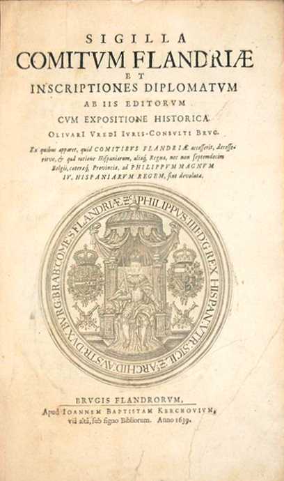 Bruges, Bèlgica: Frontis d'Olivarius Vredius Sigilla Comitum Flandriae